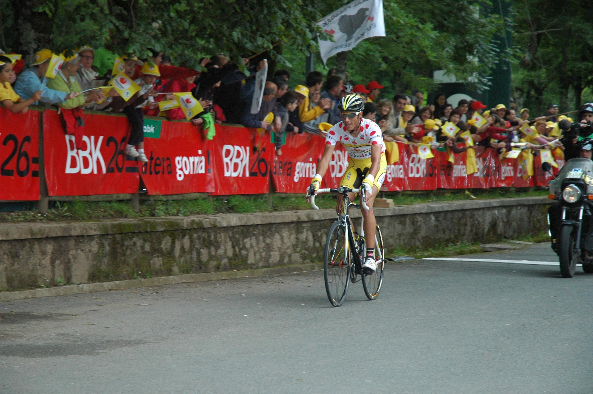 Eros Capecchi als winnaar van de Euskal Bizikleta 2008.